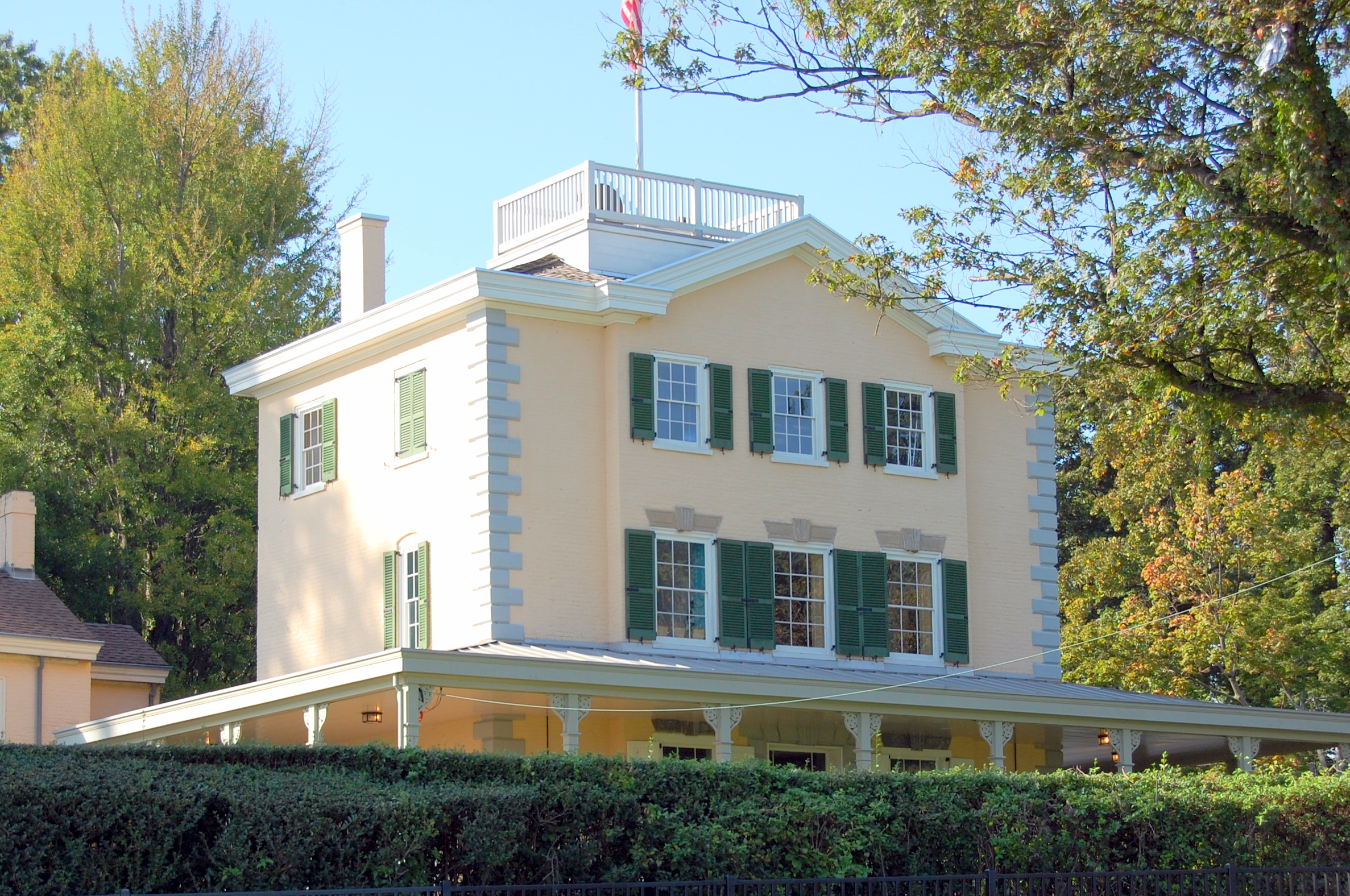 Belmont Mansion (Philadelphia), Belmont Ave.